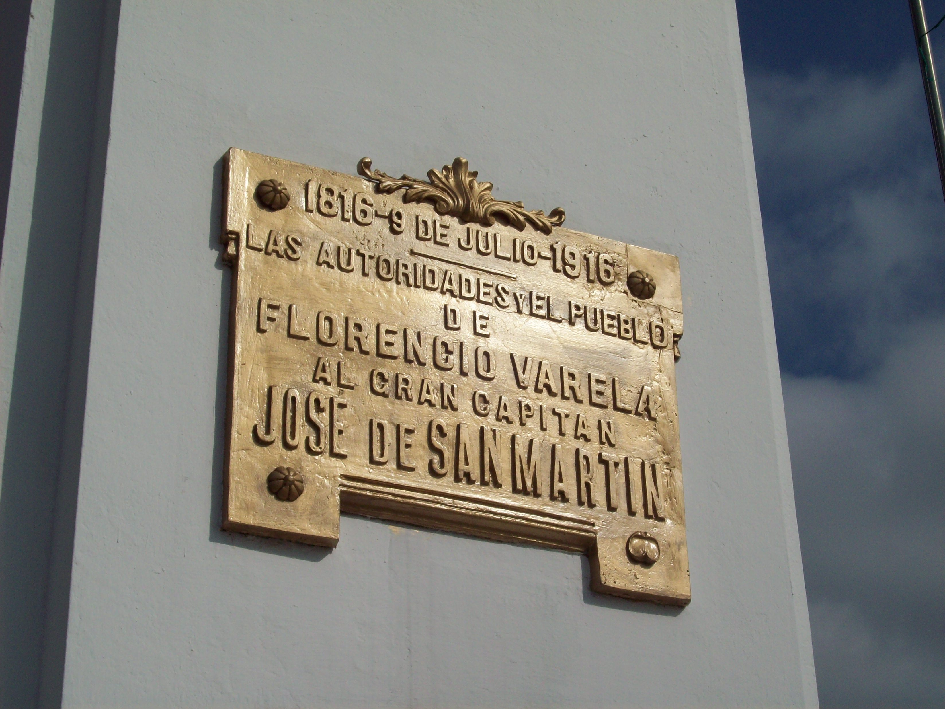 Placa de bronce a José de San Martín, en su monumento en la Avenida de F. Varela que lleva su nombre.